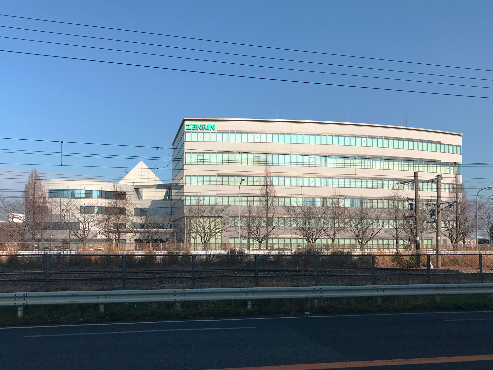 株式会社ゼンリン本社ビル。